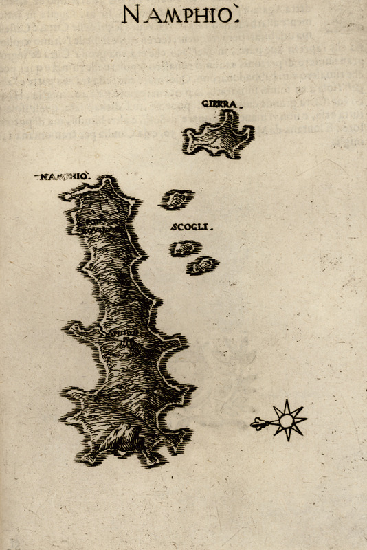 Marco Boschini. L’Arcipelago con tutte le Isole, ScogliSecche e Bafsi fondi, con i mari, golfi, seni, porti, citta e castelli; Nella forme, che se vedono al tempo presente…, Venice, Francesco Nicolini, 1658.